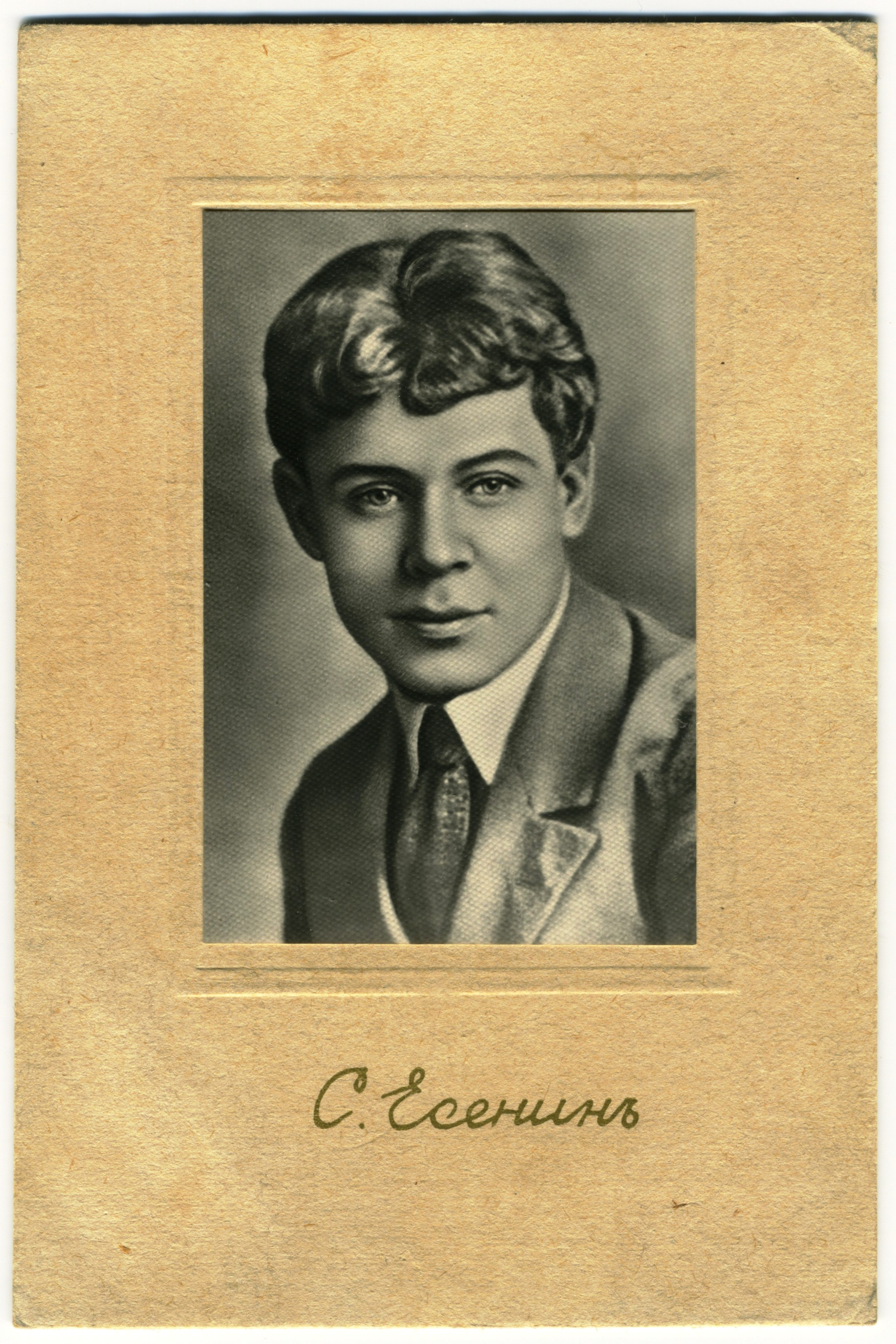 Портрет и автограф Сергея Есенина на паспарту (фото в рамке, ставится на стол)